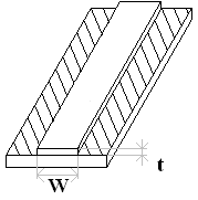 Rozmery mikropásikového vedenia